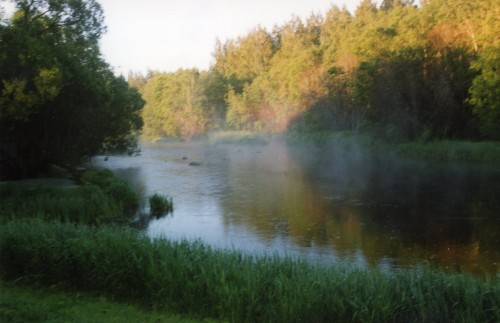 Pärnu jõgi, Lüüste